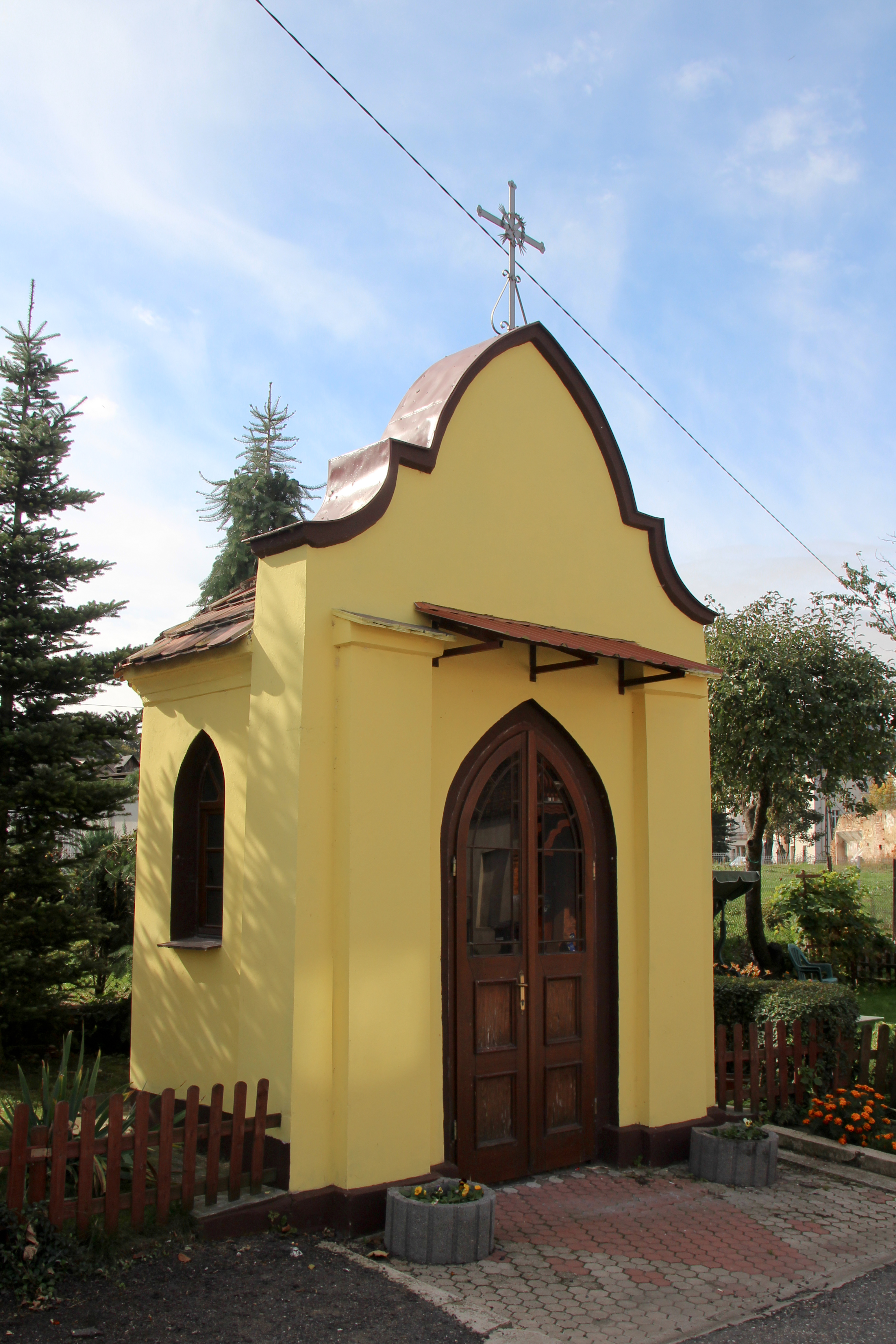 Ciężkowice (w j. niem. Czienskowitz) – wieś w Polsce położona w województwie opolskim, w powiecie kędzierzyńsko-kozielskim, w gminie Polska Cerekiew.